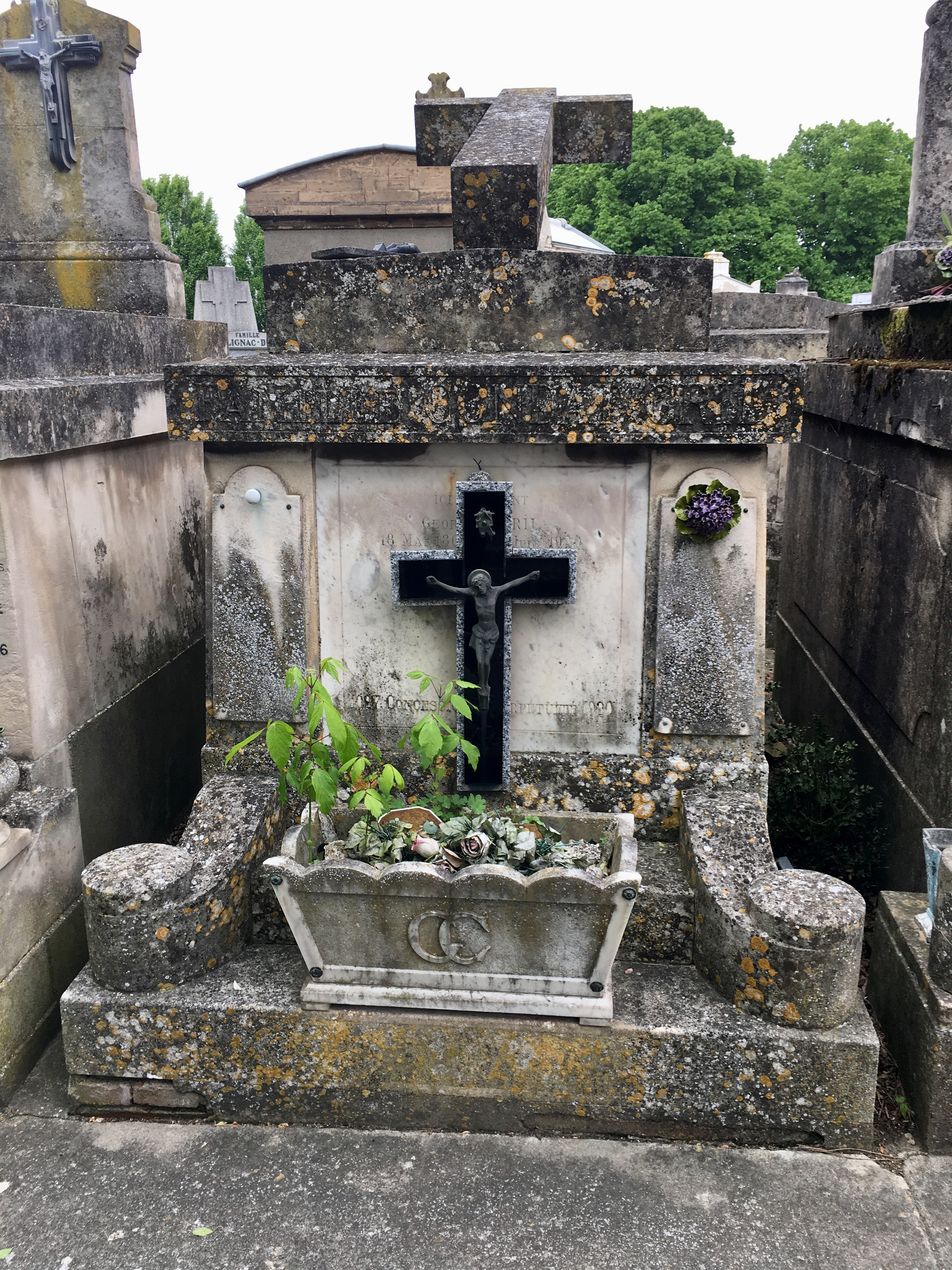 Caveau des familles Condat et Gril au cimetière de Salonique à Toulouse